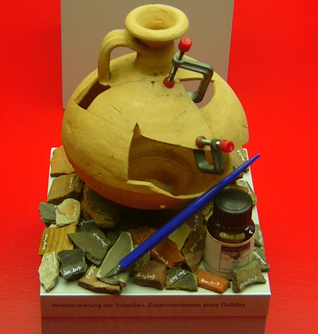 Rekonstruierung von archäologischen Funden (Dokumentation in der Archäologischen Staatssammlung München)